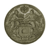 Arlbergtunnel 1884, Durchbruchsmedaille anlässlich des Arlbergtunnel-Tunneldurchbruchs am 19. November 1883